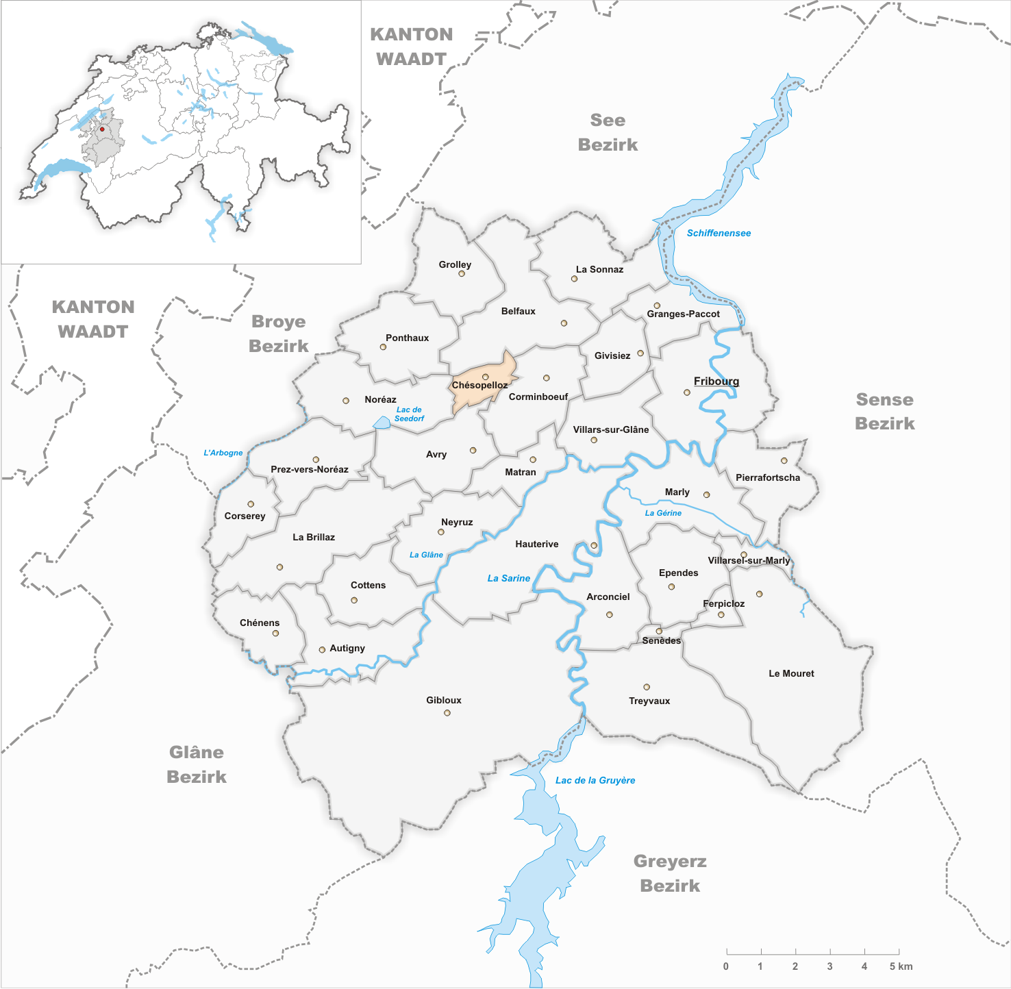 Municipality Chésopelloz